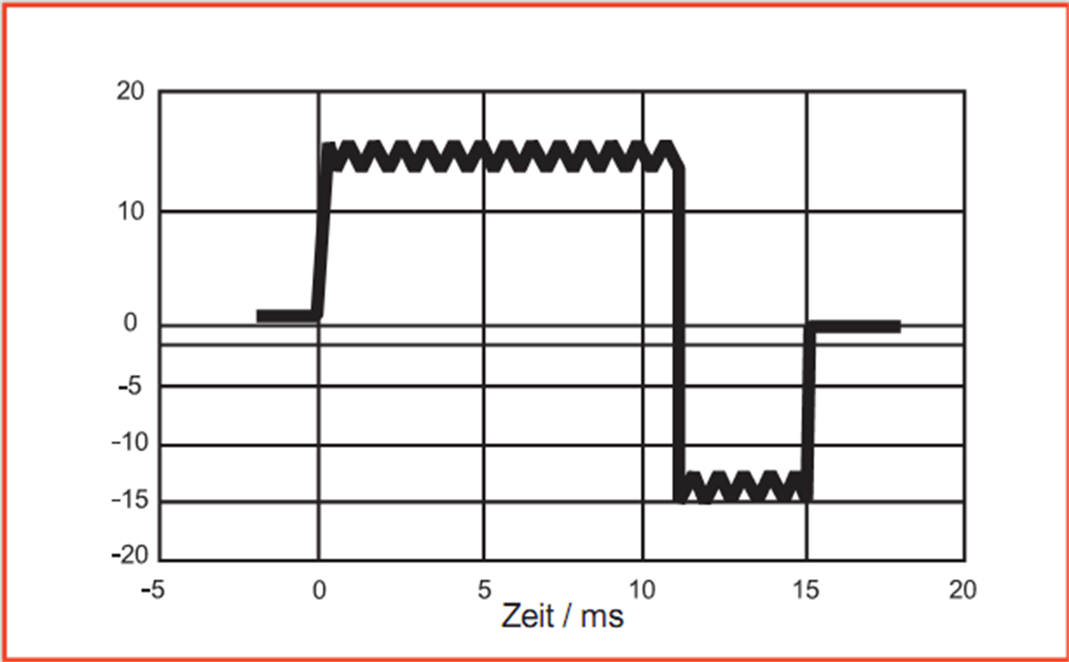 Stromgeregelter biphasischer Impuls eines modernen Defibrillators